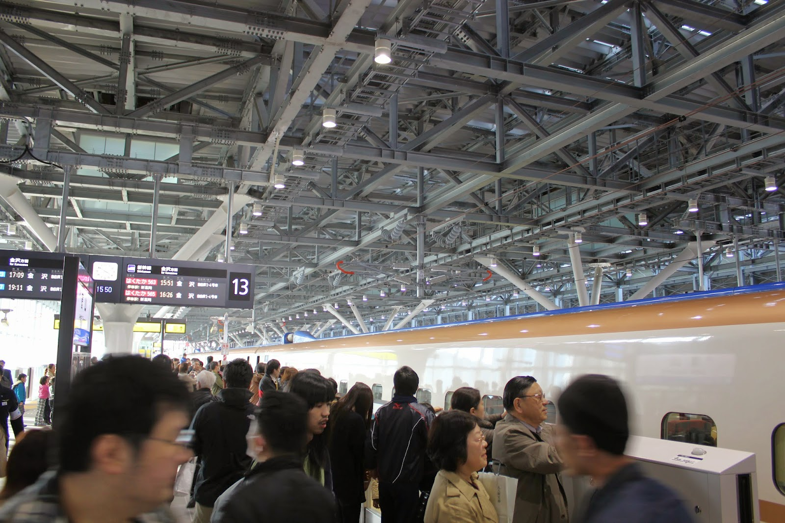 北陸新幹線